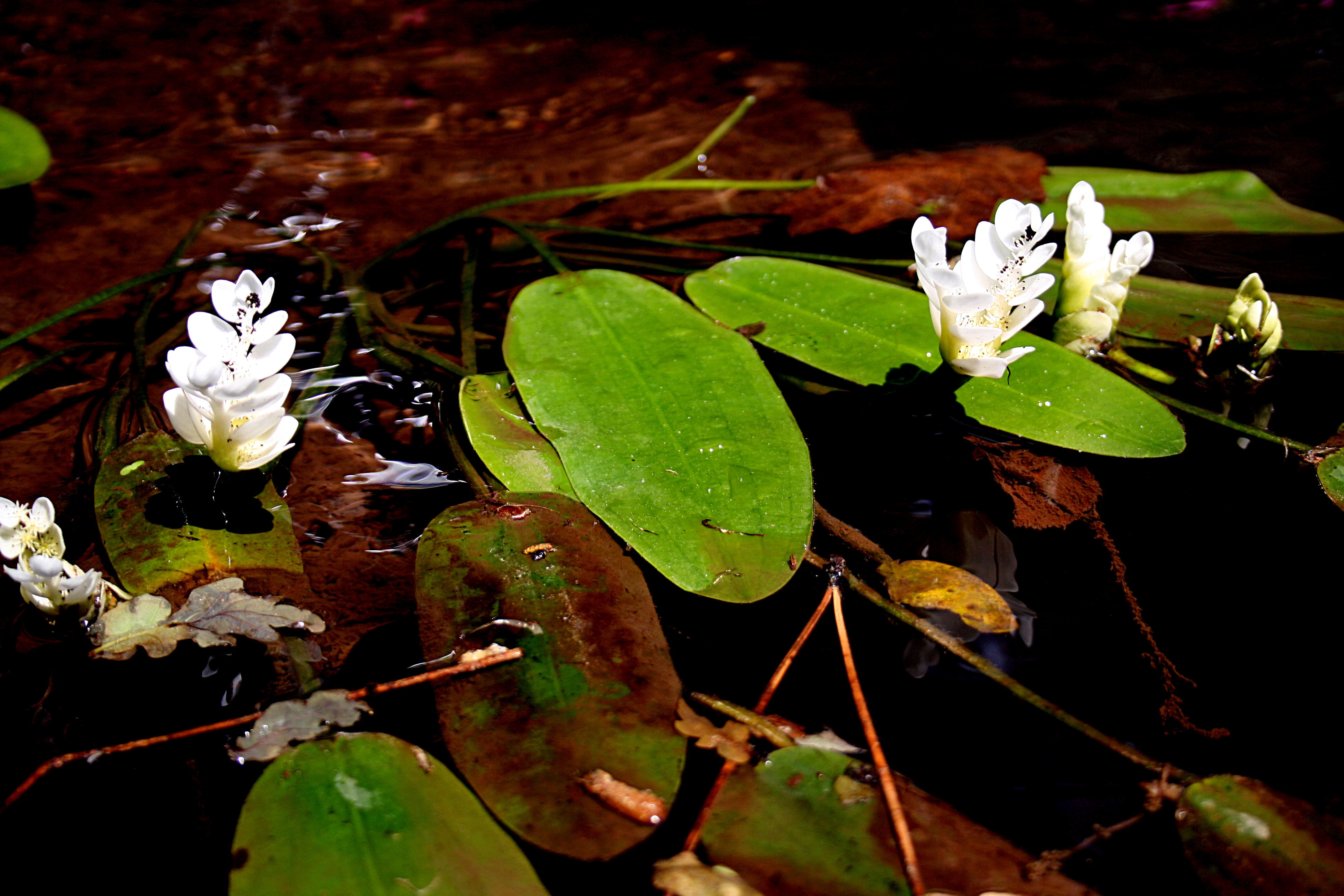 Monte (Funchal) Species : Aponogeton distachyos